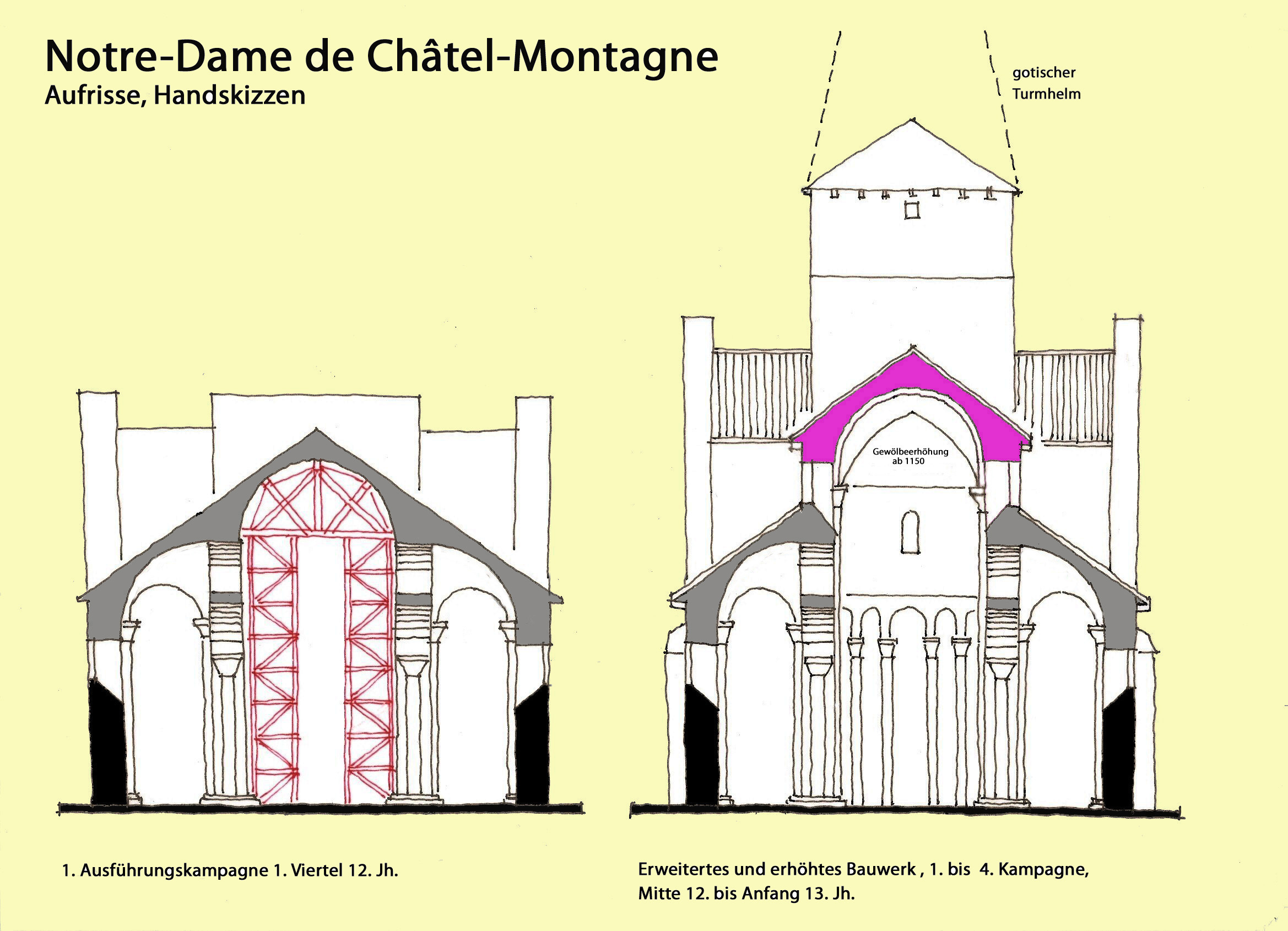 N.-D._de_Châtel-Montagne,_Aufrisse, Handskizze